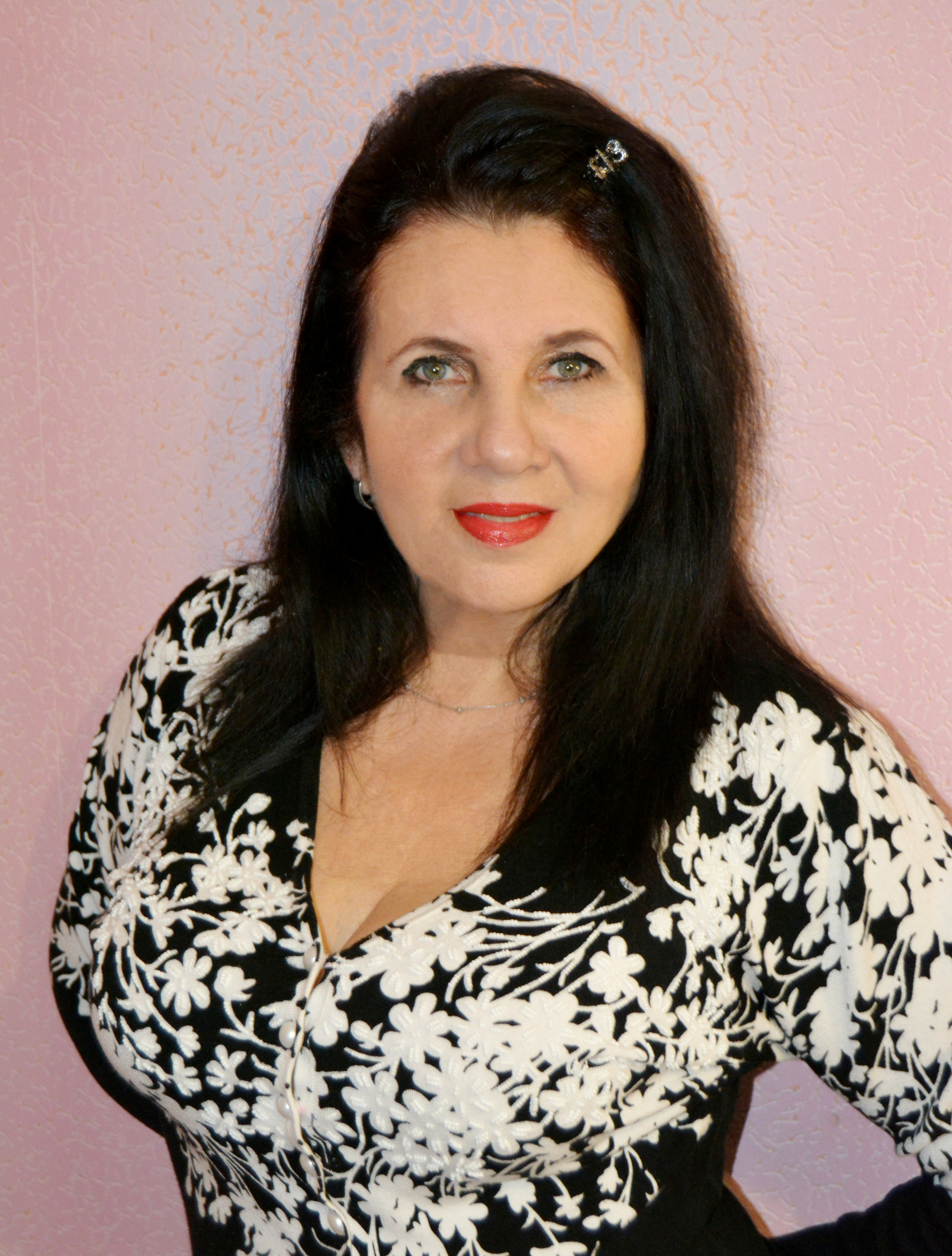 Галина